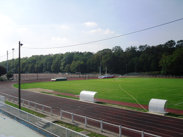 Le stade Robert Desnos de Verrières-le-Buisson (91)